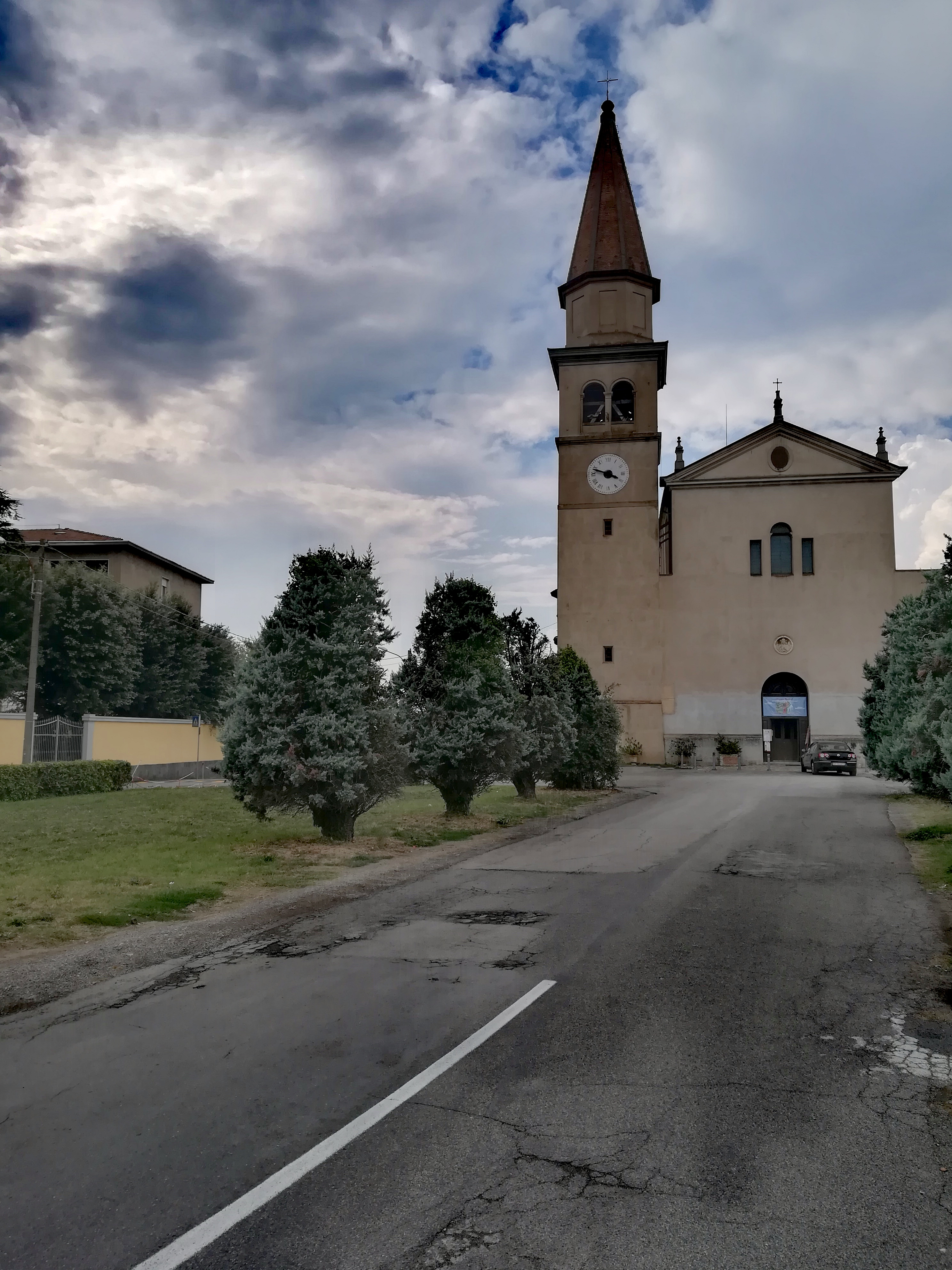 Parrocchia Di S. Maria Assunta In Bibbiano